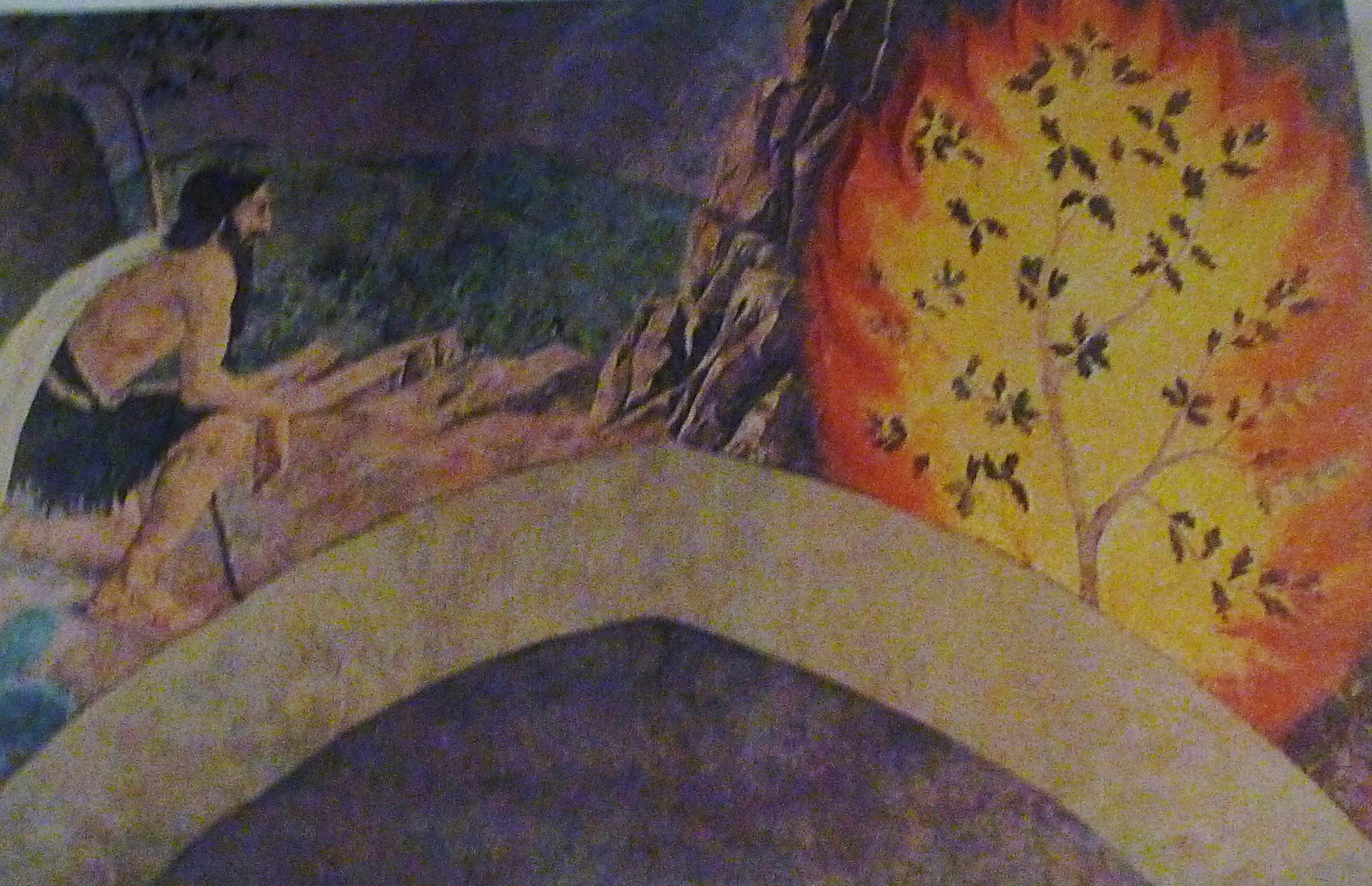 Châteauneuf-du-Faou : église paroissiale, fonts baptismaux, fresque de Sérusier (Moïse et le buisson ardent)